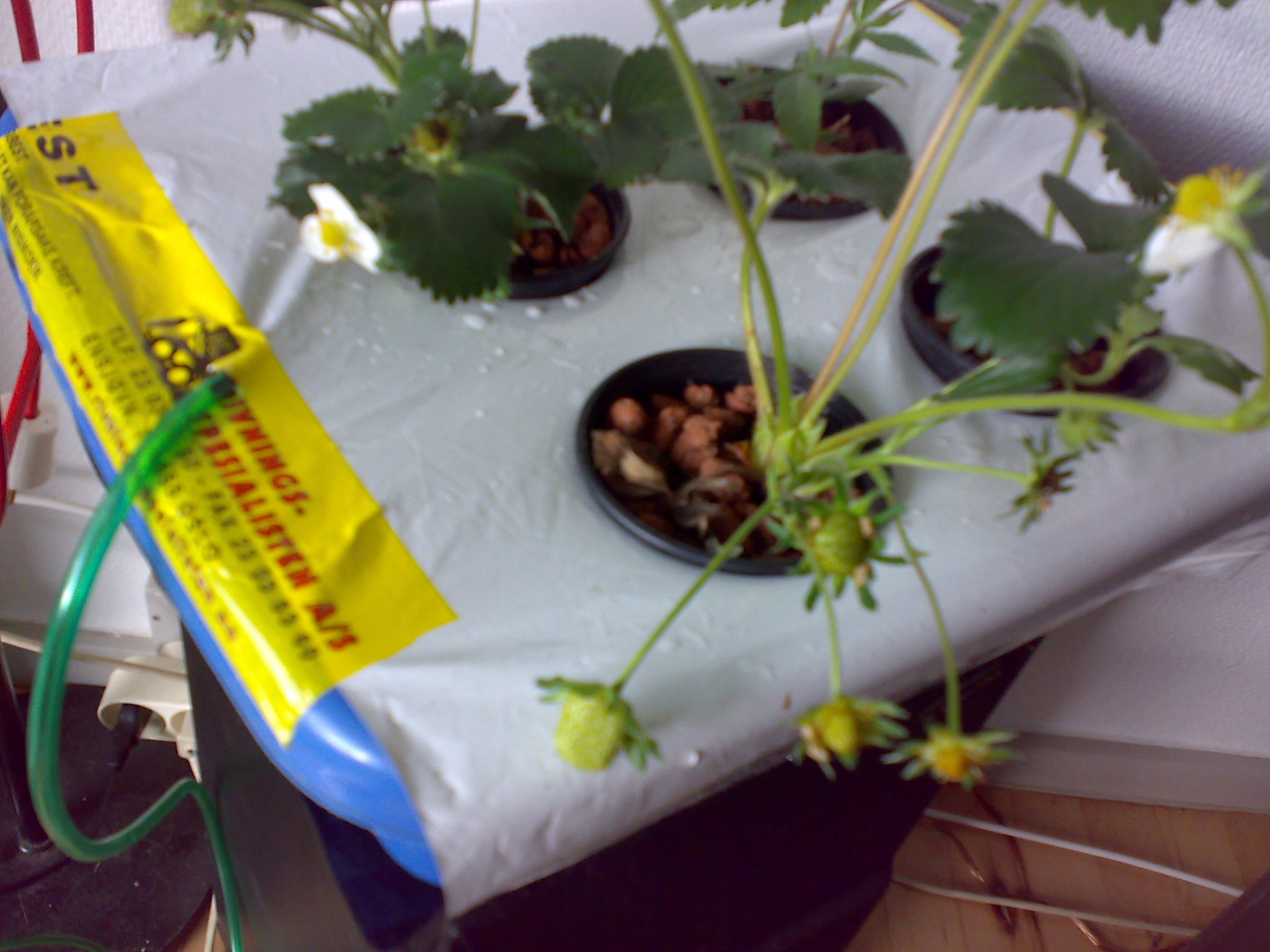 Jordbær i dybvandskultur